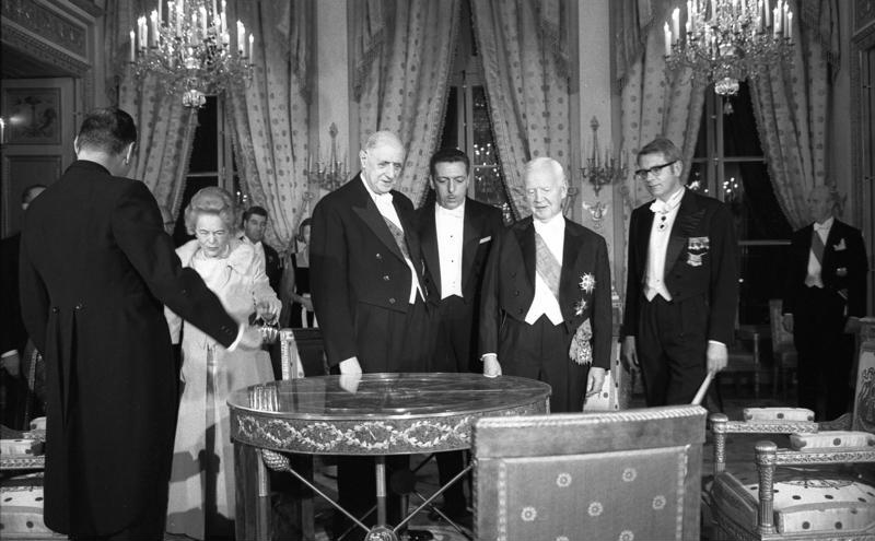 Paris, Bankett Einweihung Deutsche Botschaft Einweihung der deutschen Botschaftsresidenz, Palais Beauharnais, in Paris. 15-35 Abendempfang für Staatspräsident de Gaulle und Außenminister Couve de Murville und Bundespräsident Lübke. [im Vordergrund: Bundespräsident Lübke (2. von rechts), Präsident de Gaulle (4.v.re.) und Wilhelmine Lübke (5.v.re.) beim Empfang zur Einweihung der Deutschen Botschaft in Paris] Abgebildete Personen: Gaulle, Charles de: Staatspräsident, General, Frankreich Lübke, Heinrich: Bundespräsident, Bundesminister für Ernährung, Landwirtschaft und Forsten, CDU, Bundesrepublik Deutschland